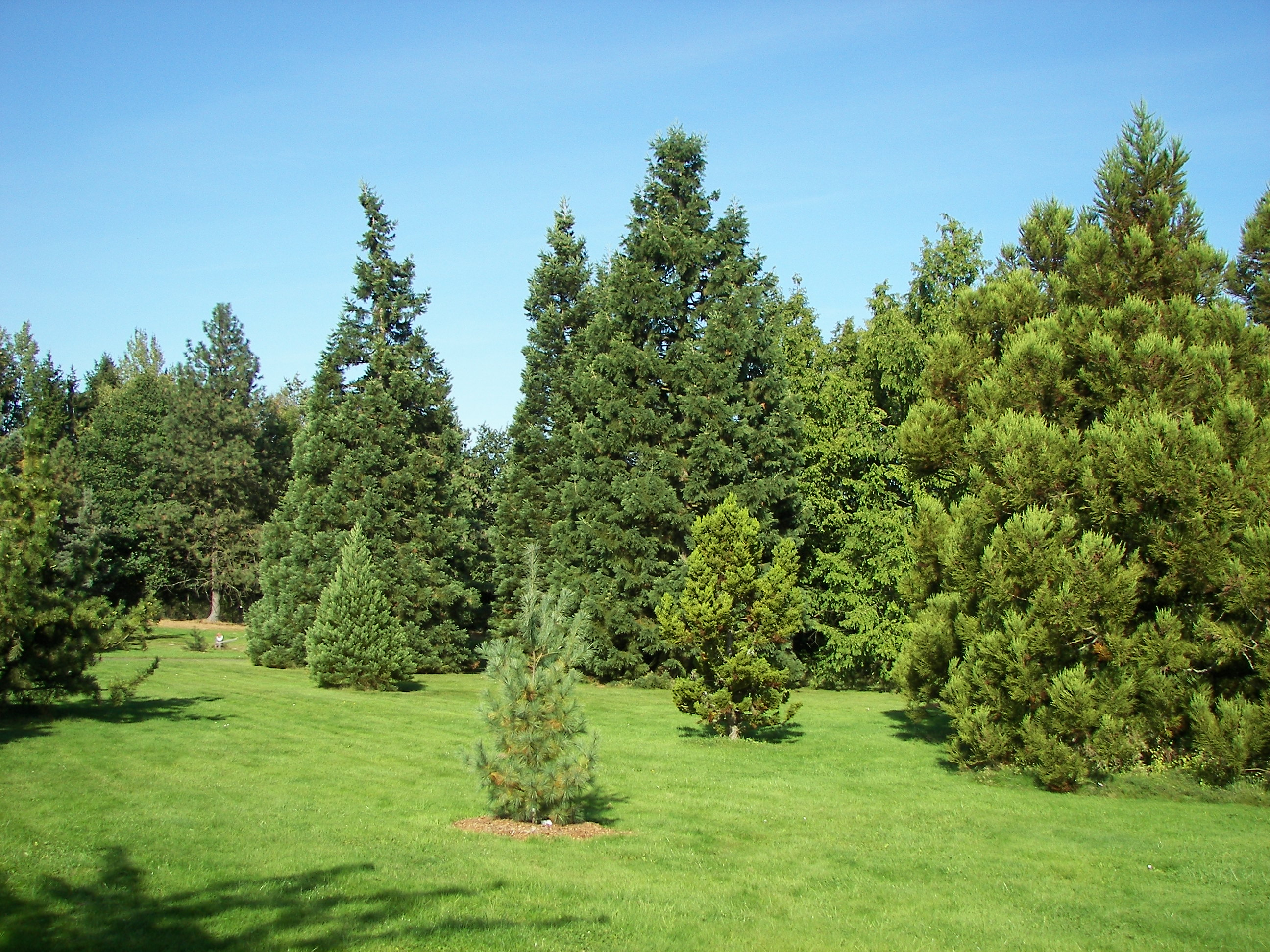 Neuer Botanischer Garten Marburg, Arboretum, Abteilung Pinetum